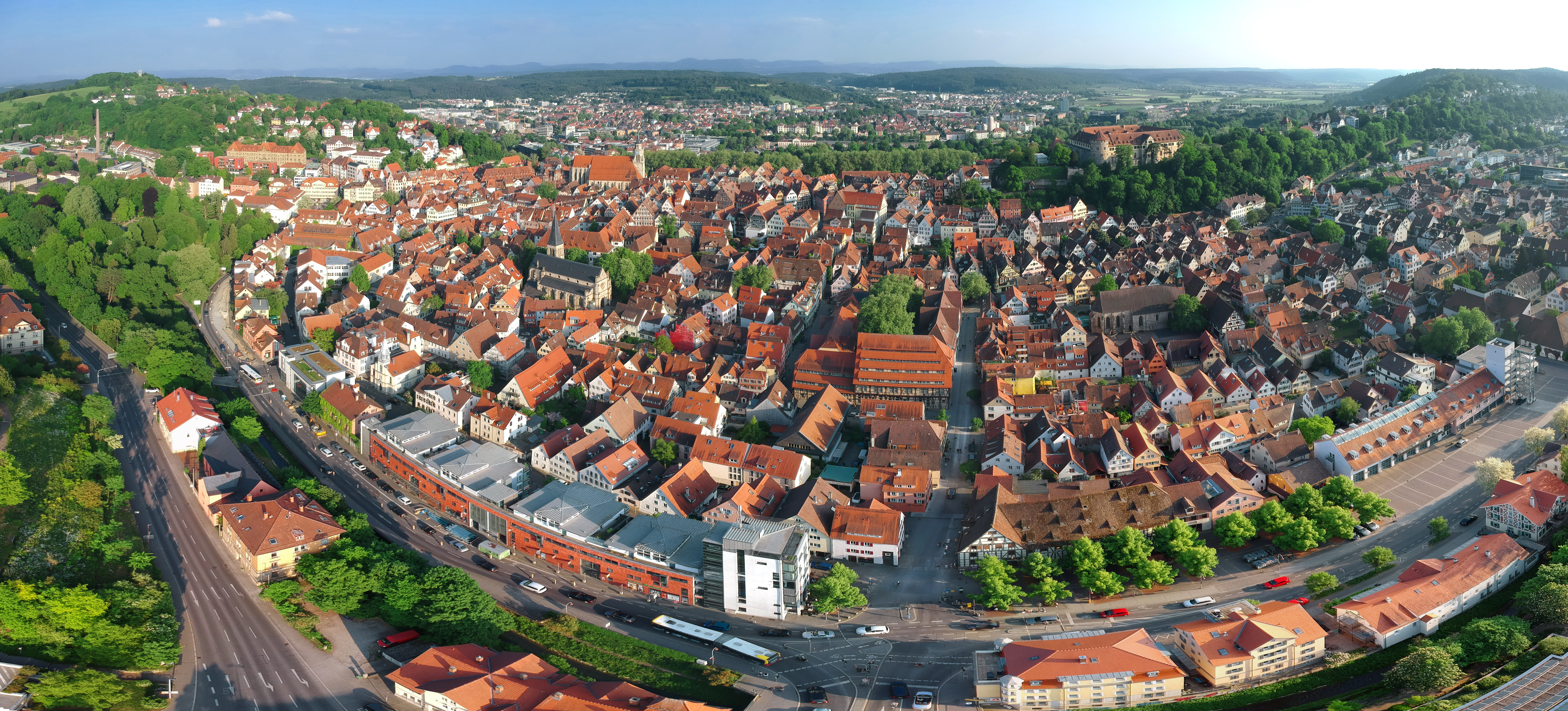 Innenstadt Tübingens